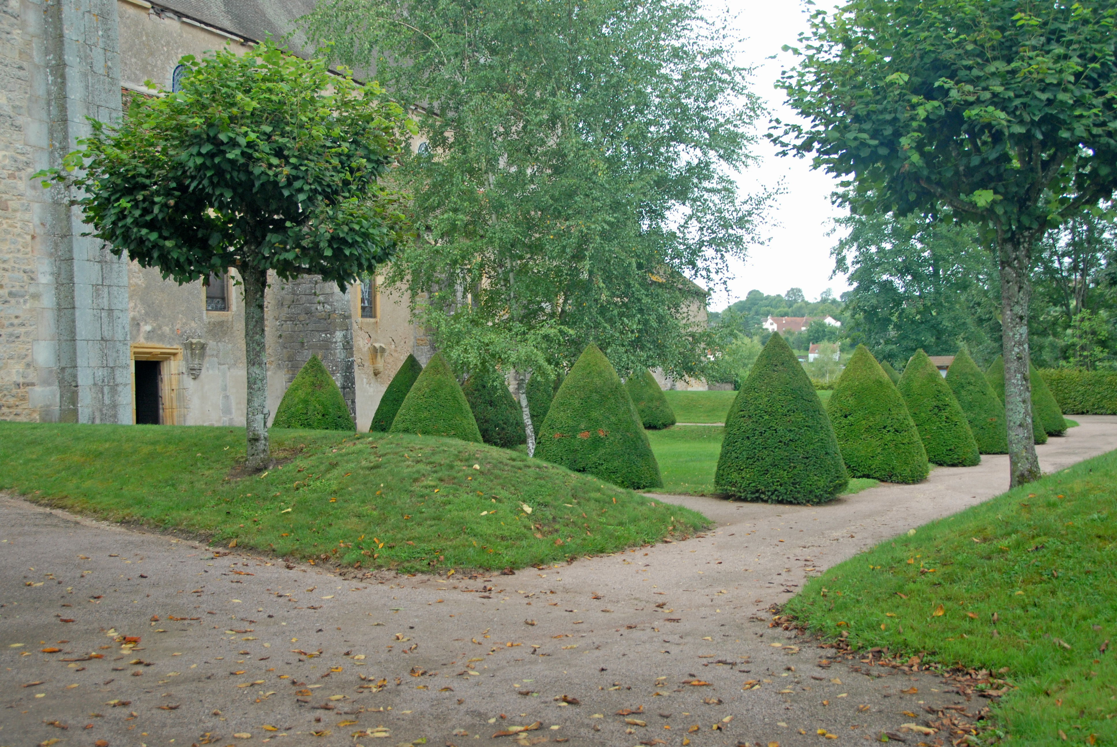 Priorat, Nachbildung Kreuzgang durch Grünanlage von S